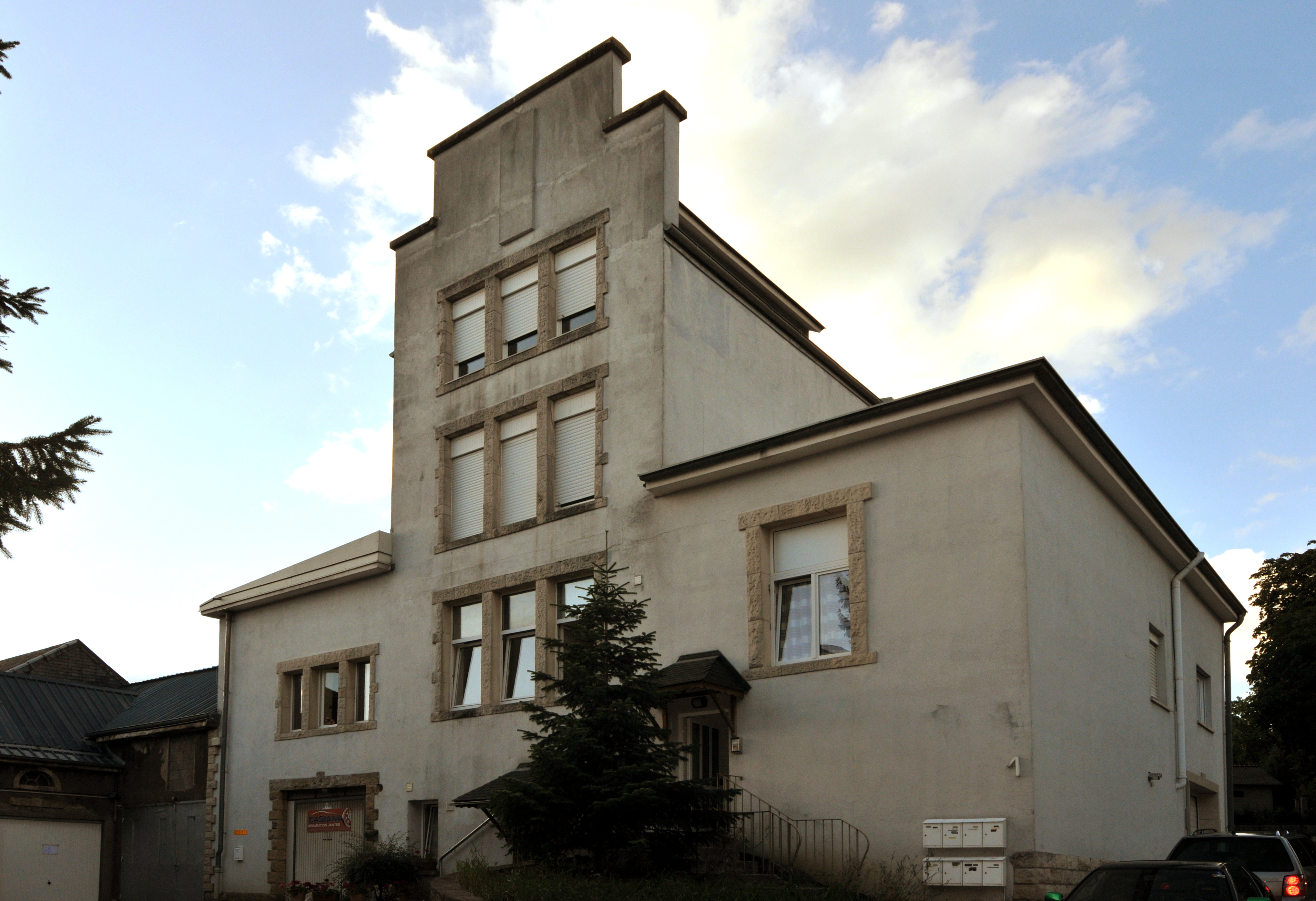 Déi fréier Diddelenger Brauerei.